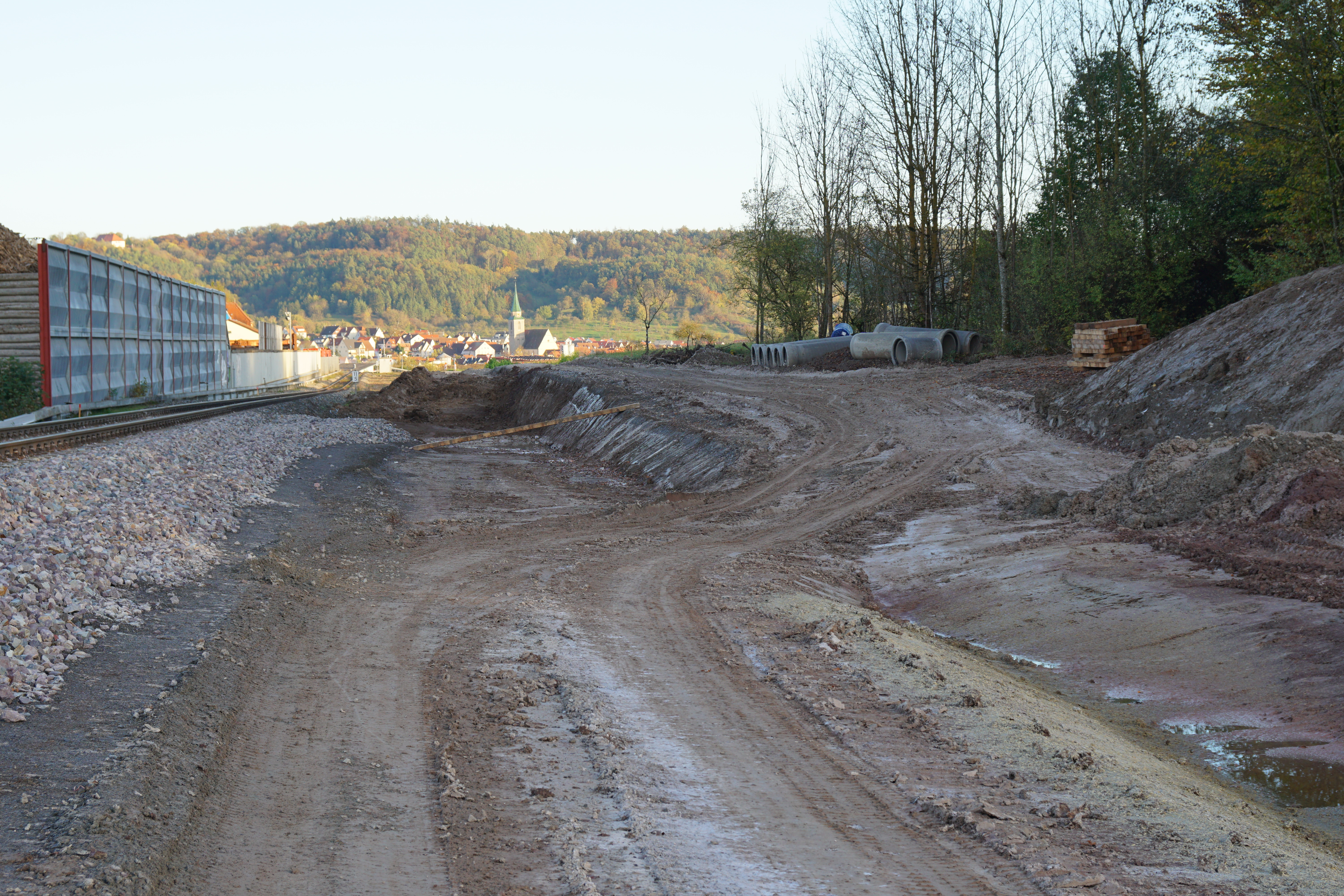 Bauarbeiten beim Bahnhof Breitenholz. Die Ammertalbahn wird an dieser Stelle zweispurig ausgebaut.